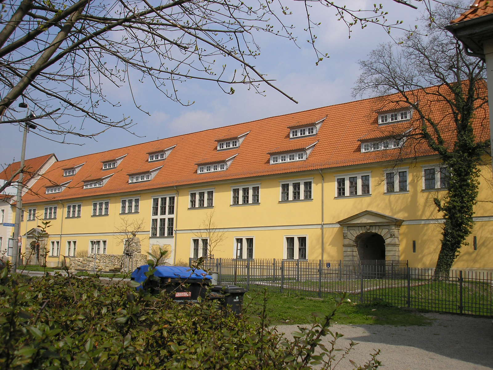 Landratsamt des Ilm-Kreises in Arnstadt (Thüringen).